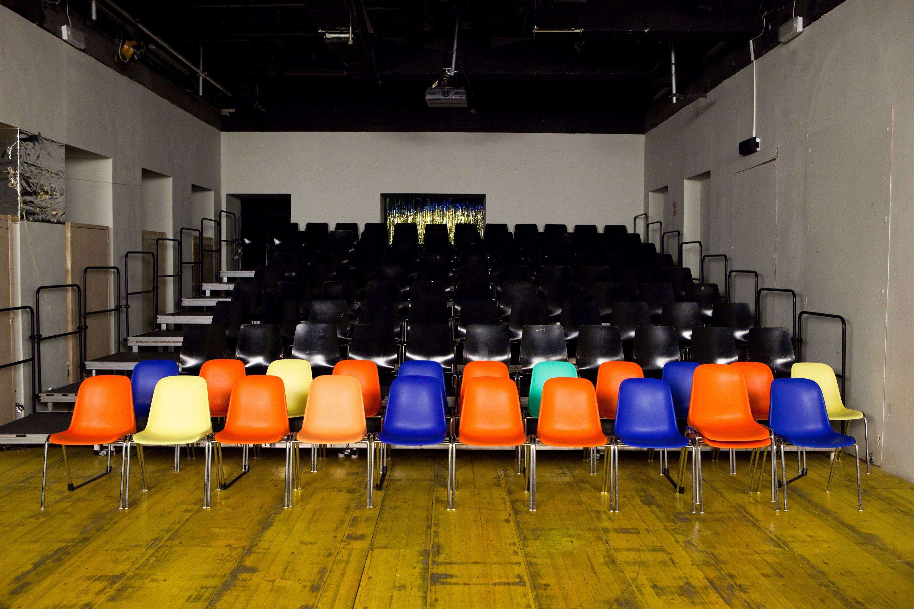 Aufführungssaal "Garage1"